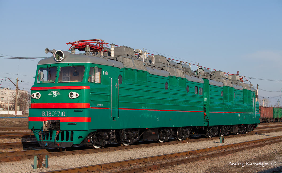 КР Запорожский ЭРЗ 02.2016 г.